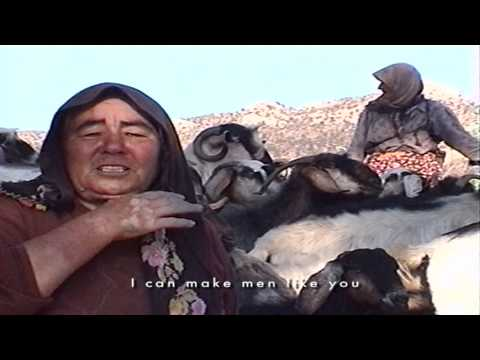 Kadın İş Türküleri Belgeseli